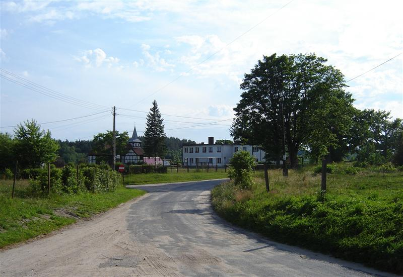 Kowalki - widok na kościół i budynek dawnej szkoły